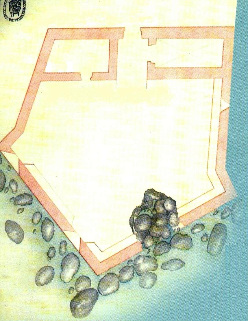 Forte do Terreiro. MACHADO, Francisco Xavier. "Revista dos Fortes e Redutos da Ilha Terceira" (1772). in MARTINS, José Salgado, "Património Edificado da Ilha Terceira: o Passado e o Presente". Separata da "Atlântida", vol. LII, 2007. p. 16.